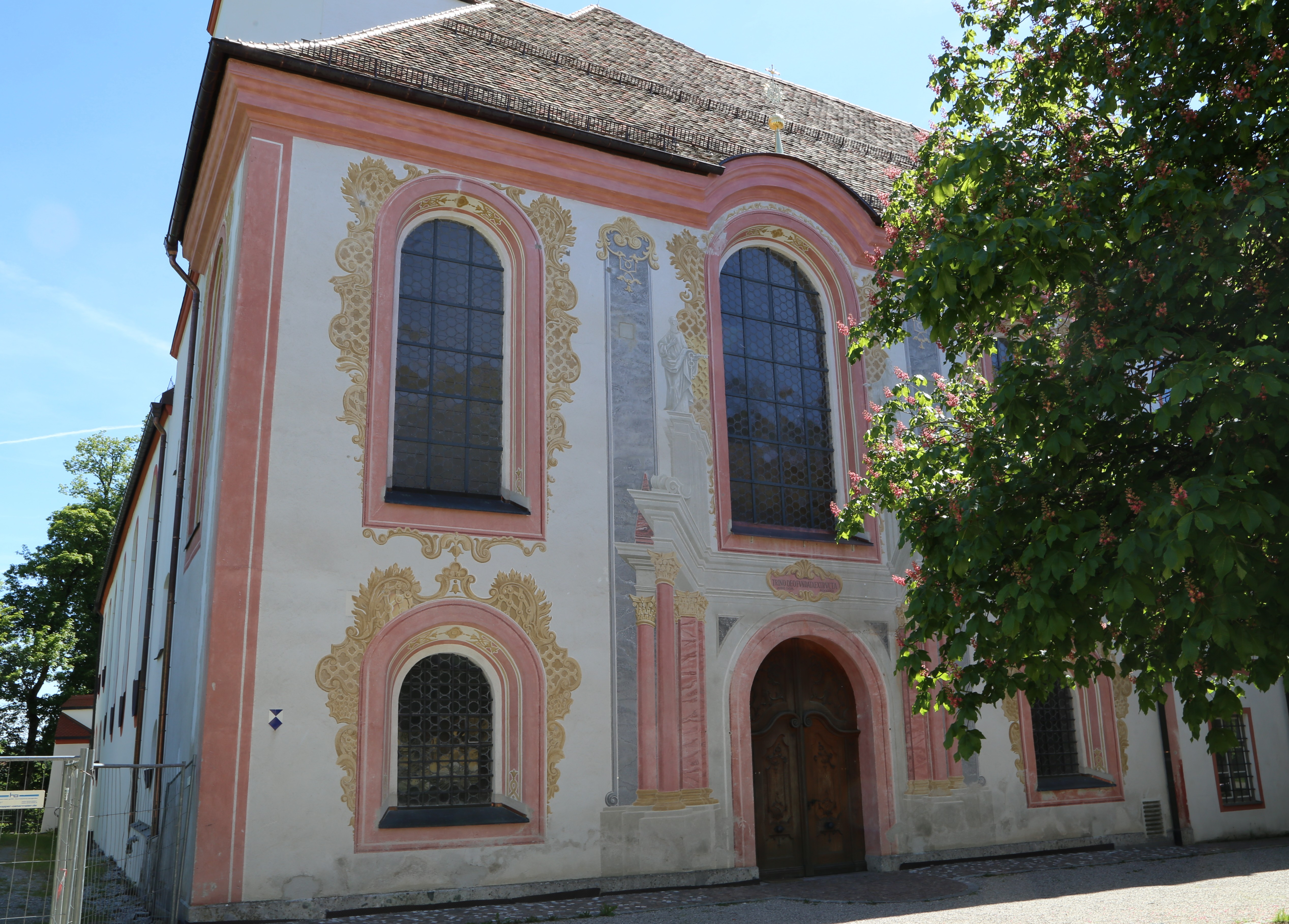 Beuerberg, Eurasburg; ehemalige Stiftskirche St. Peter und Paul, jetzt katholische Pfarrkirche, barocker Wandpfeilersaal mit Abseiten, eingezogenem Chor und nordwestlichem Zwiebelturm, Neubau nach Einsturz 1629-35, 1729/30 verlängert; mit Ausstattung